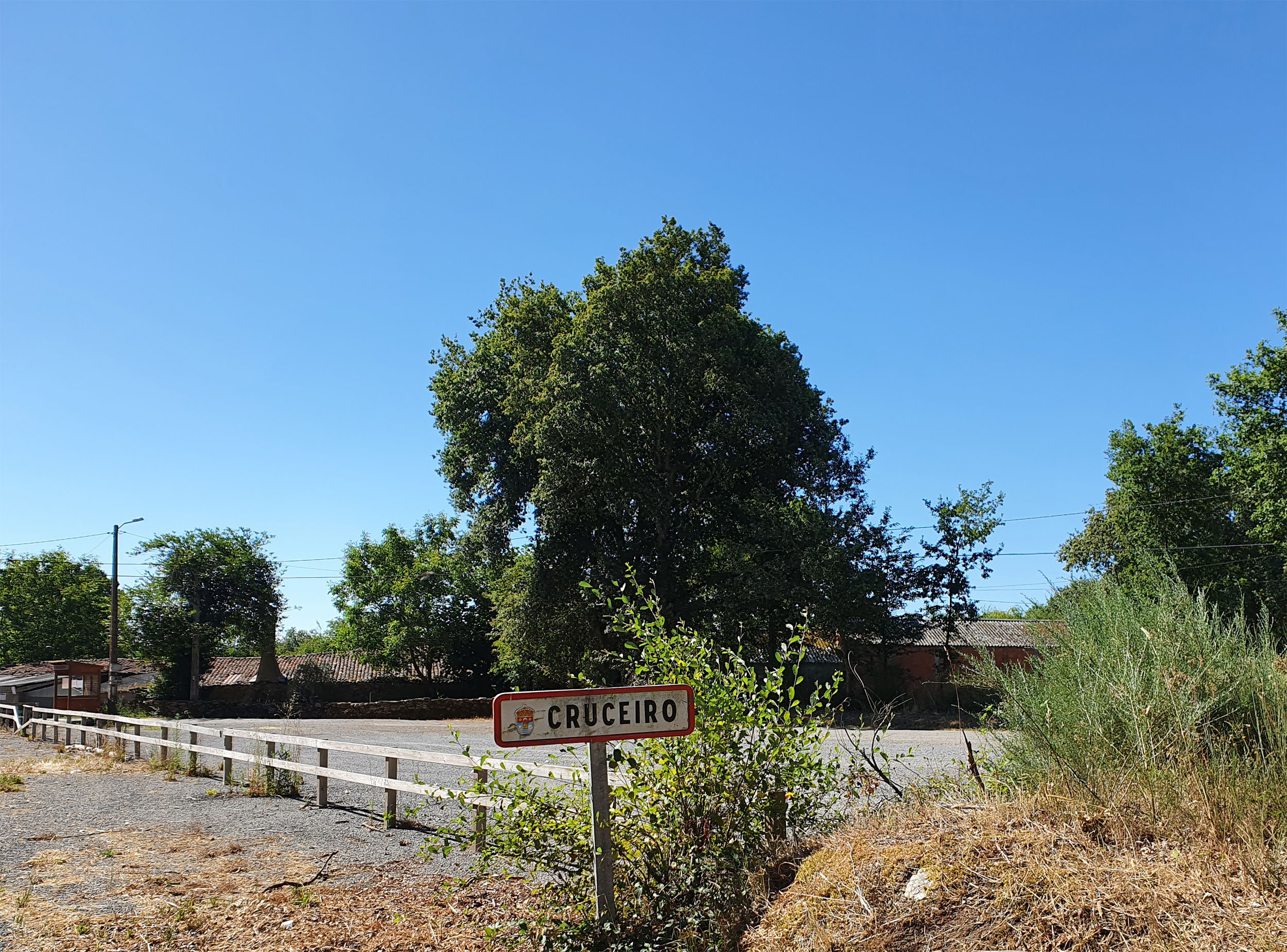 Lugar poboado de O Cruceiro, na parroquia de San Xurxo de Terrachá , Concello de Antas de Ulla